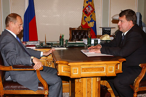 Ново-Огарево. Председатель правительства Республики Хакасия Алексей Лебедеь на рабочей встрече с Президентом Российской Федерации Владимиром Путиным.